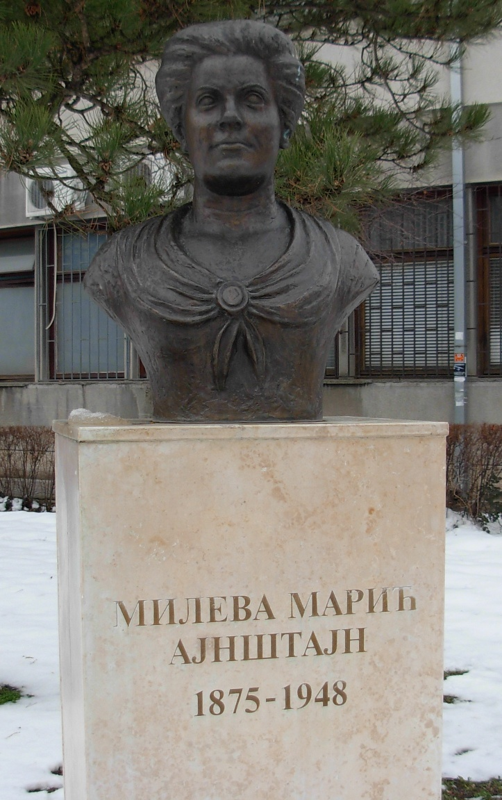 Bista Mileve Marić-Ajnštajn pored Prirodno-matematičkog fakulteta u Novom Sadu, podignuta 28. juna 2002. godine (na Dan Univerziteta).